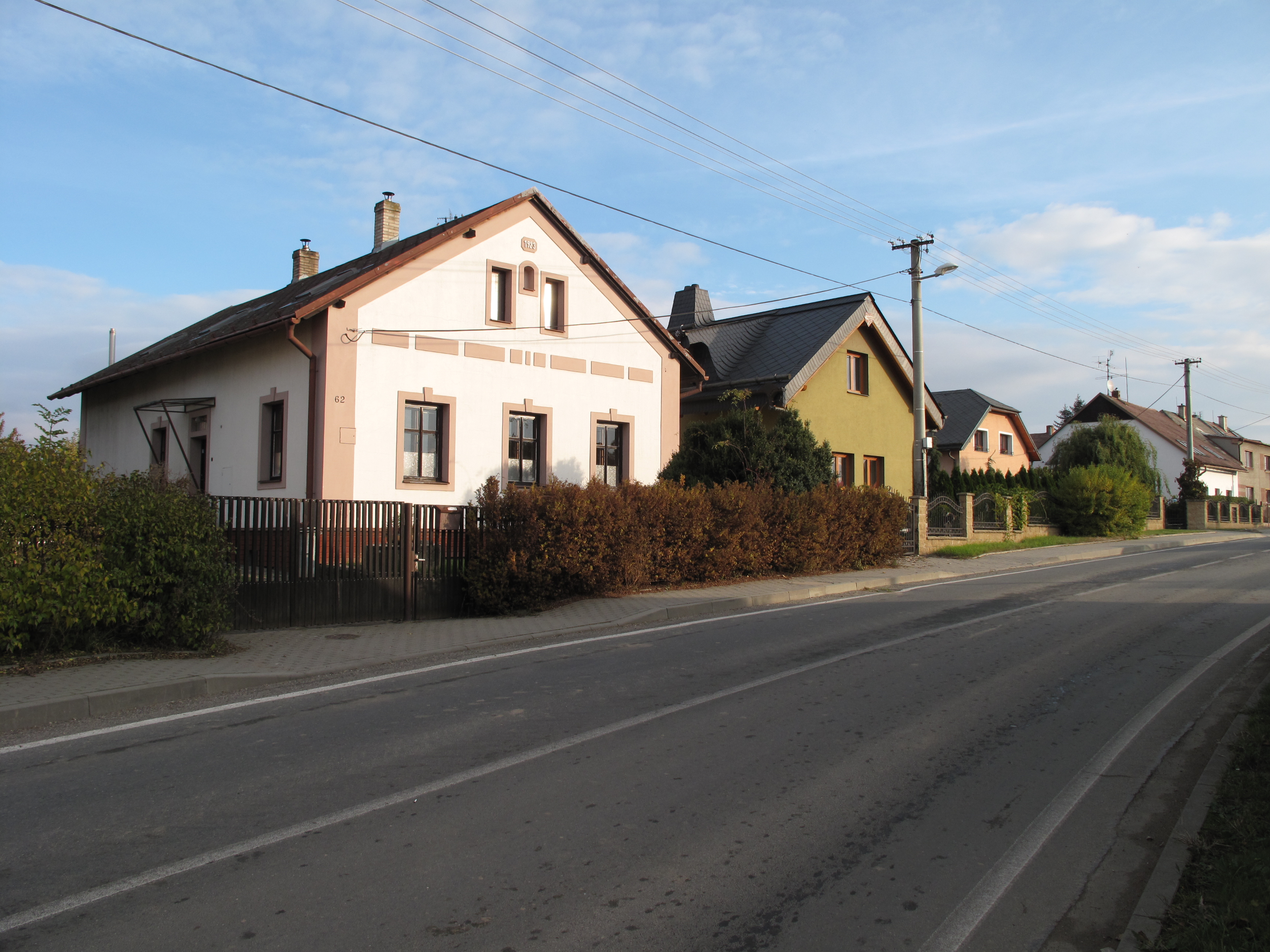 Uhlířov. Okres Opava, Česká republika.